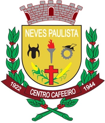 Brasão da cidade de Neves Paulista, SP